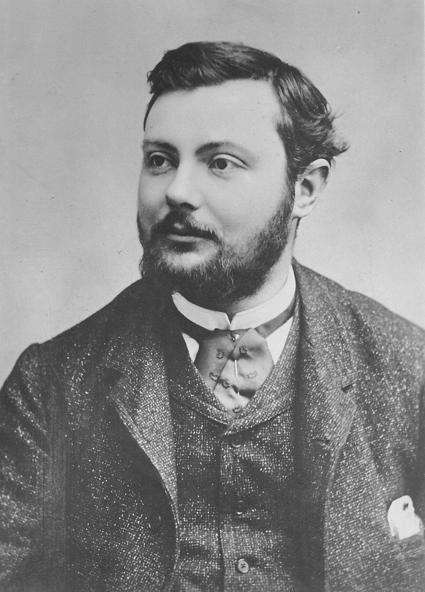 Portrait von Paul Louis T. Héroult, Erfinder der Aluminium Schmelzflusselektrolyse. Scan von Originalabzug ab Originalnegativ.